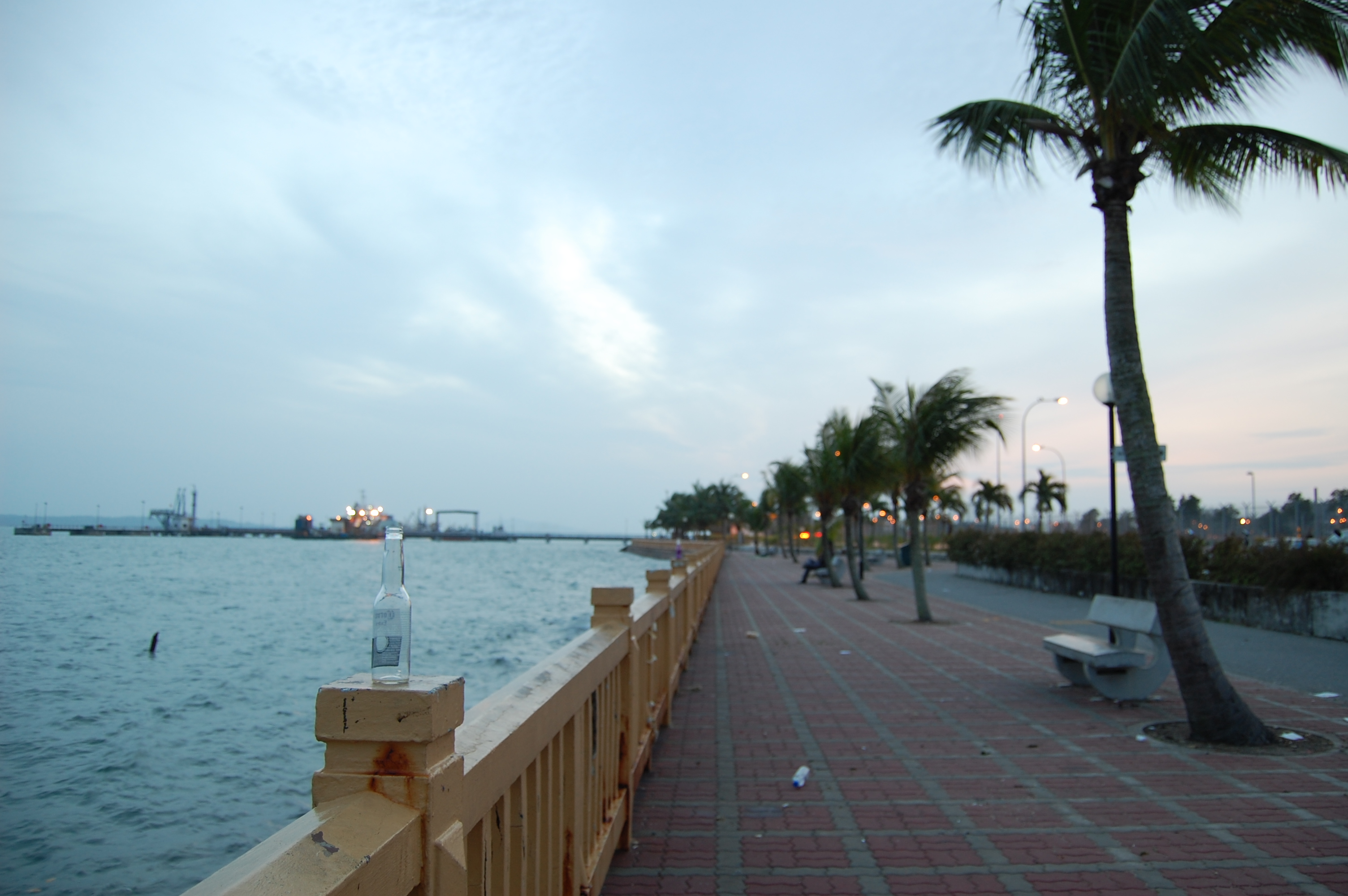 Changi Beach Park